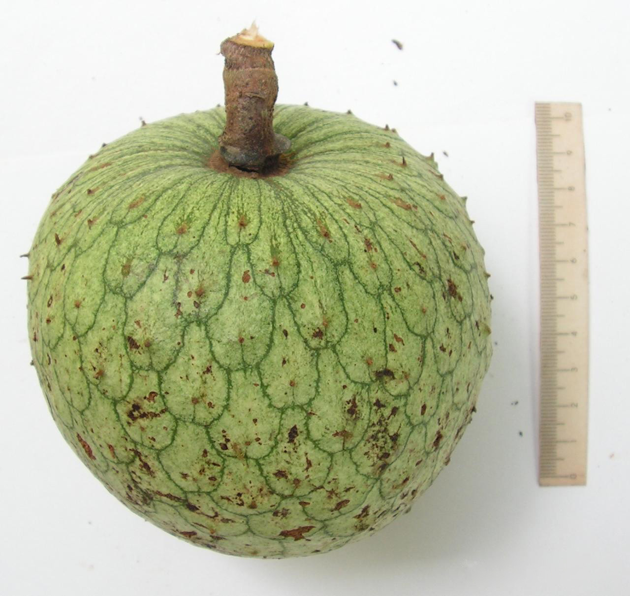 Local: Cond. Flor da Mata, Camaragibe, região de Aldeia, Pernambuco, Brasil